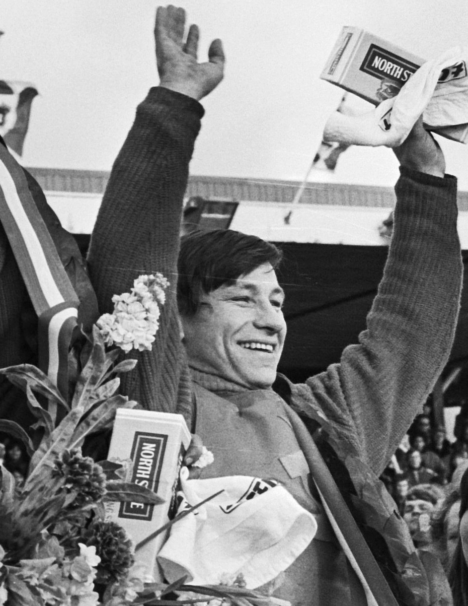 Finale ijsspeedway in Assen; de Rus Tarabensko tijdens huldiging